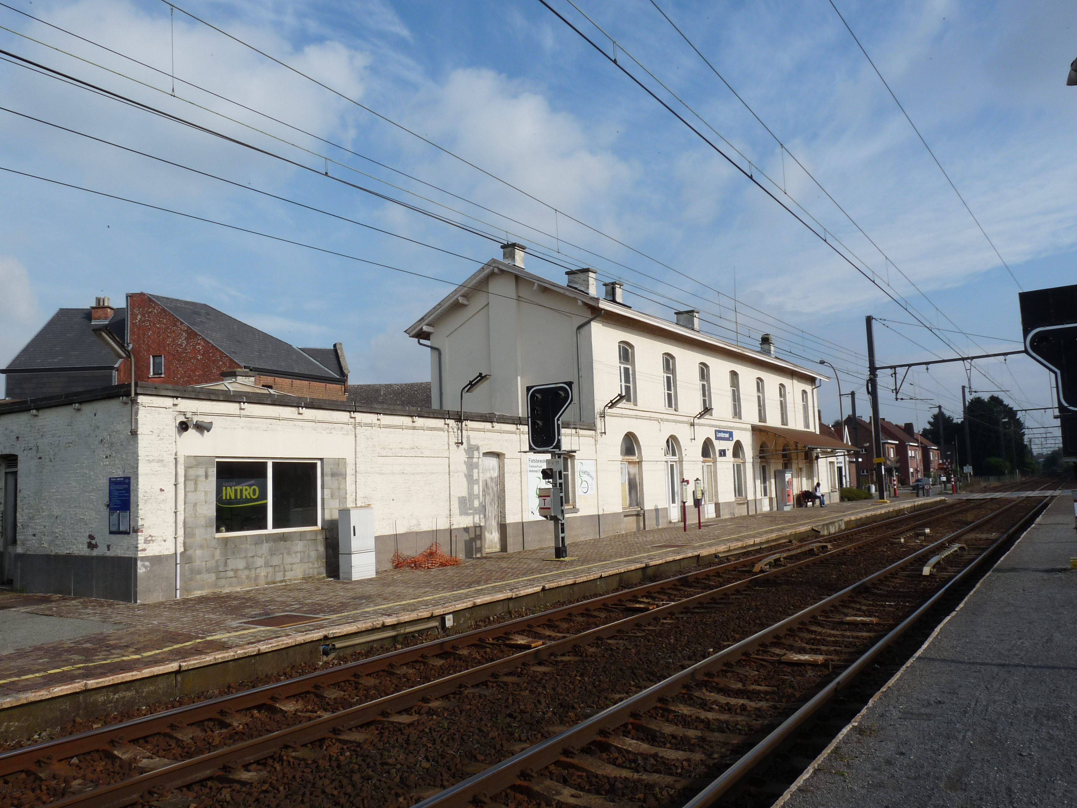 Het stationsgebouw